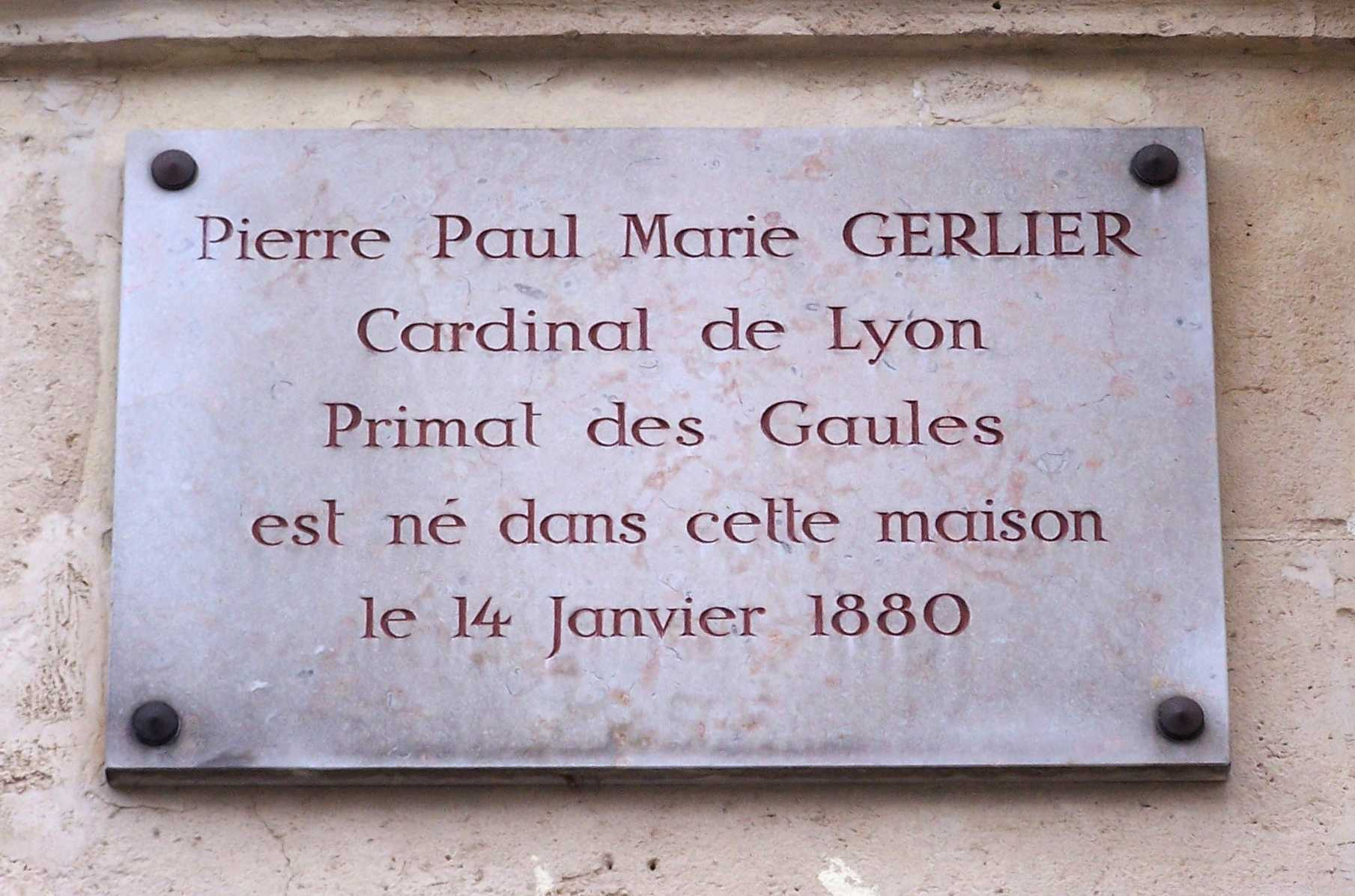 Plaque commémorative de la naissance du cardinal Pierre-Marie Gerlier, 14 rue Carnot à Versailles (Yvelines, France)